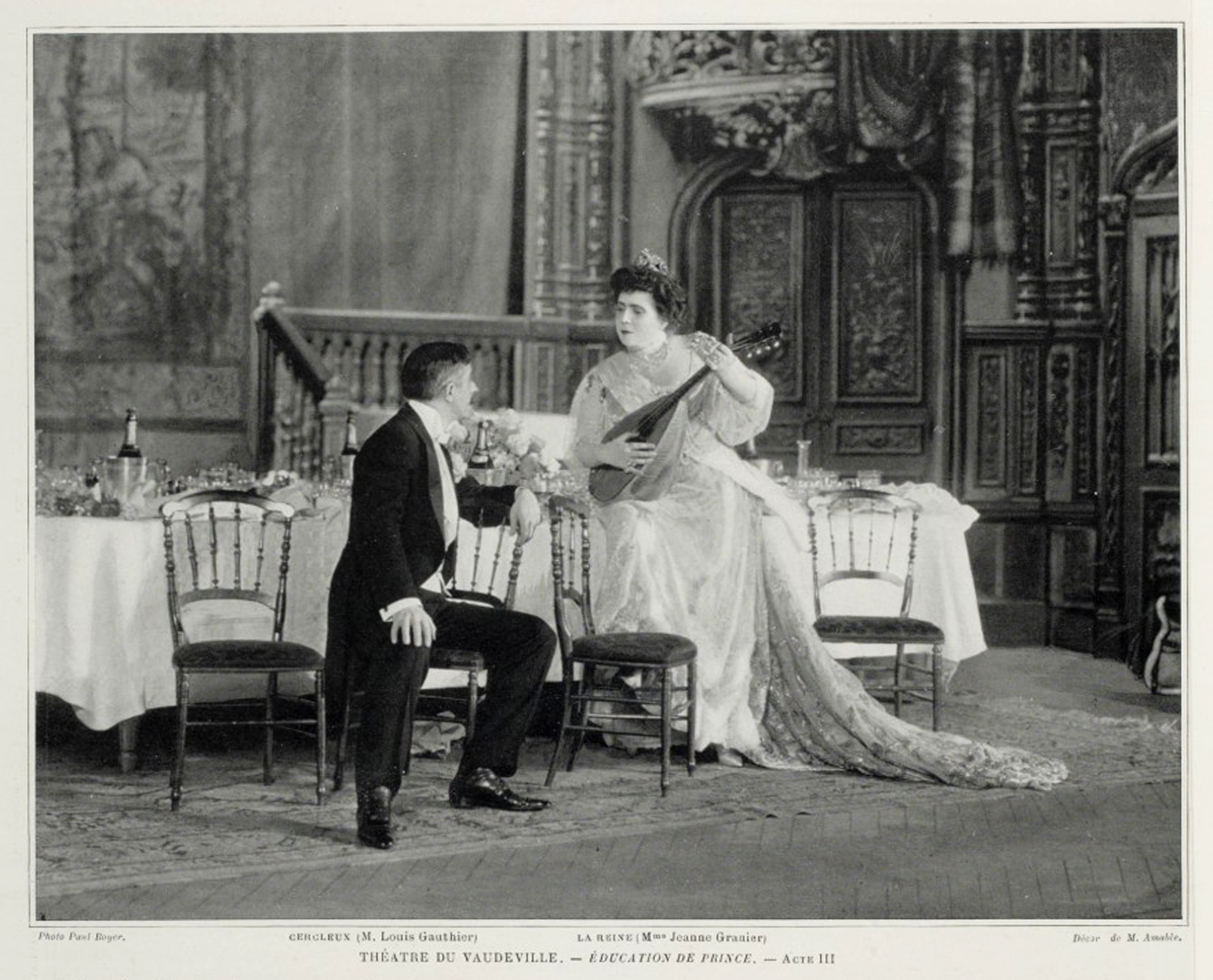 Jeanne Granier et Louis Gauthier dans Éducation de prince de Maurice Donnay au théâtre du Vaudeville ; cliché publié dans la magazine Le Théatre.